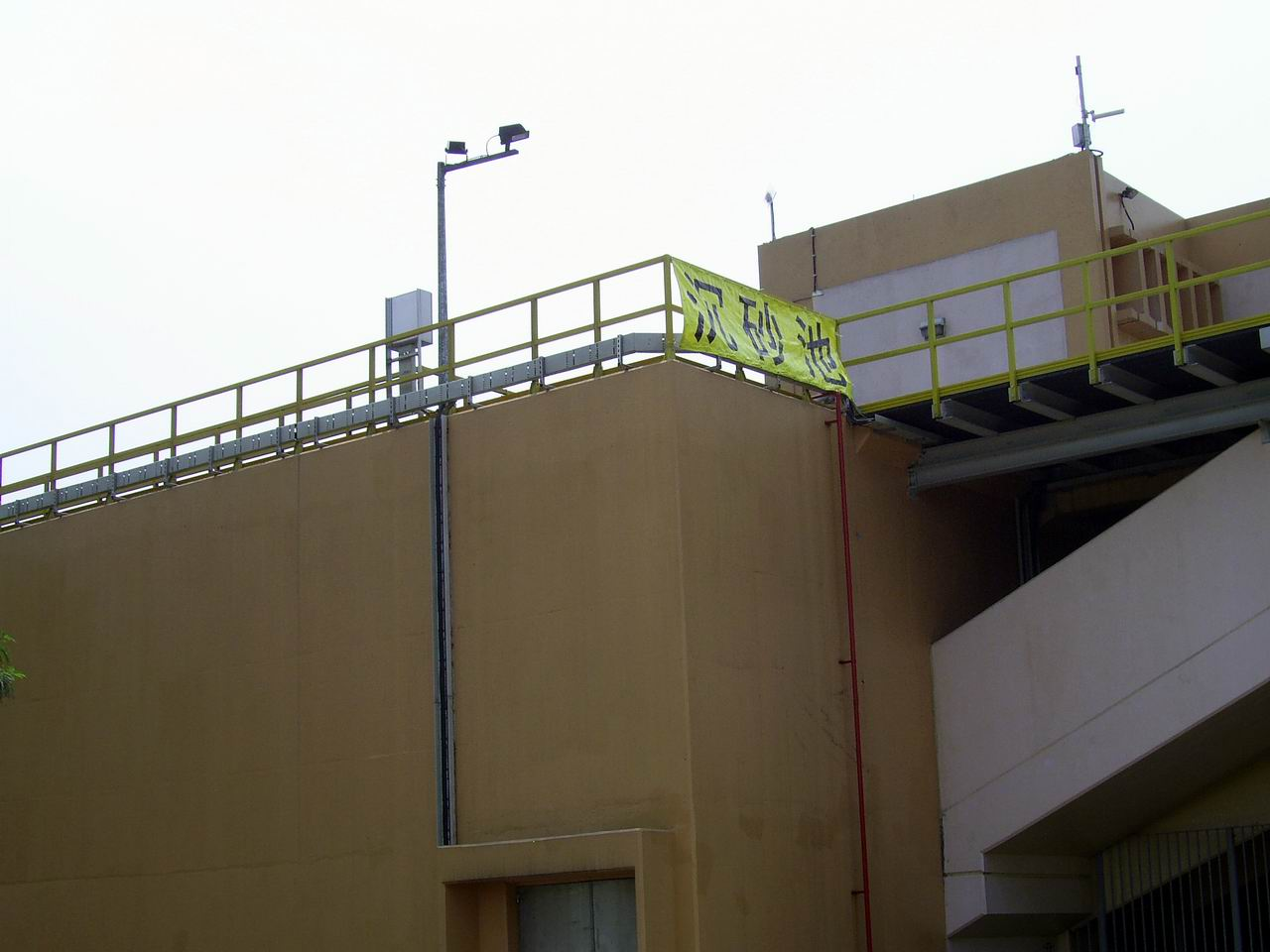 沙田污水處理廠沉砂池